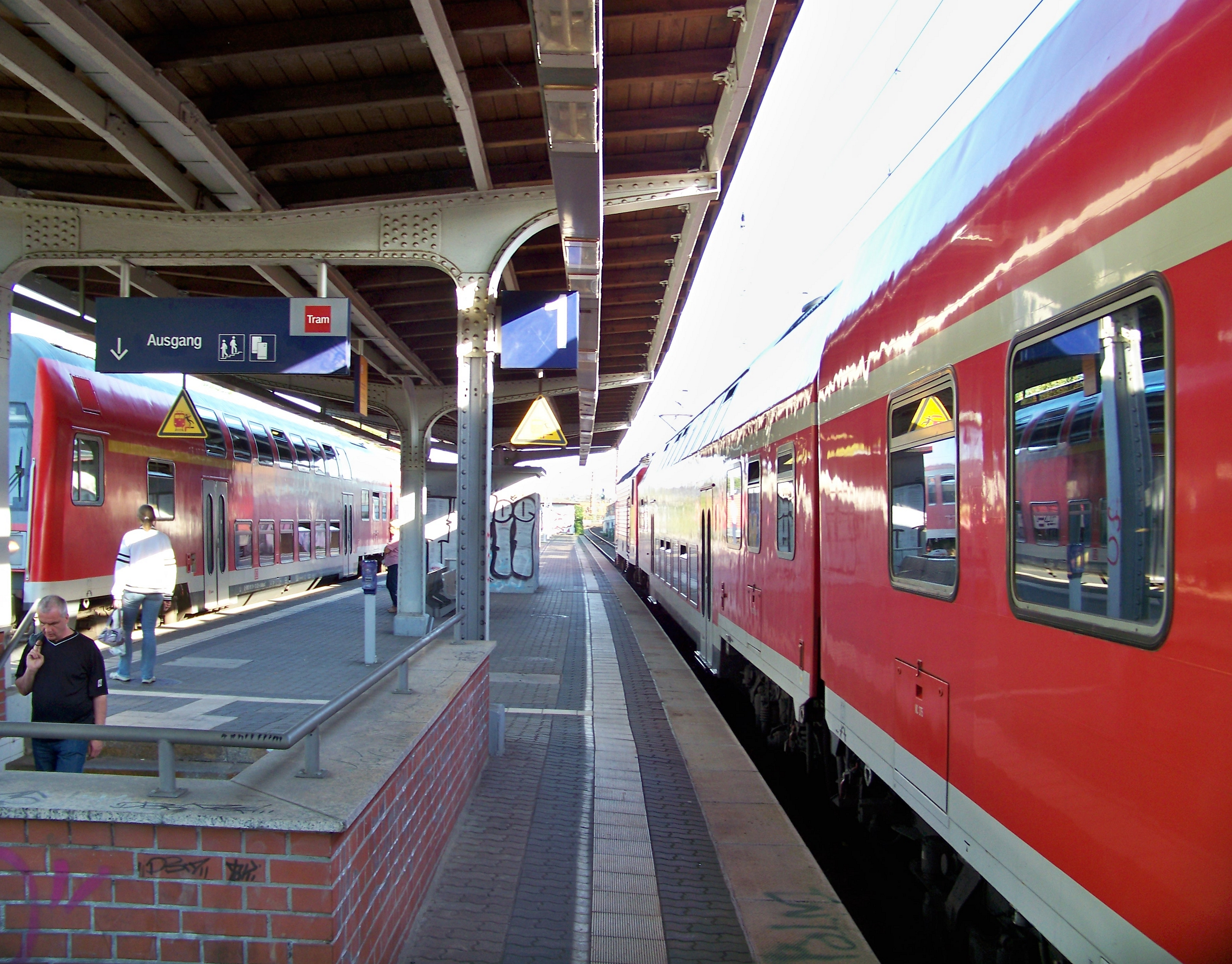 Tiefbahnsteig der Gleise 1 und 2 am Bahnhof Leipzig-Gohlis